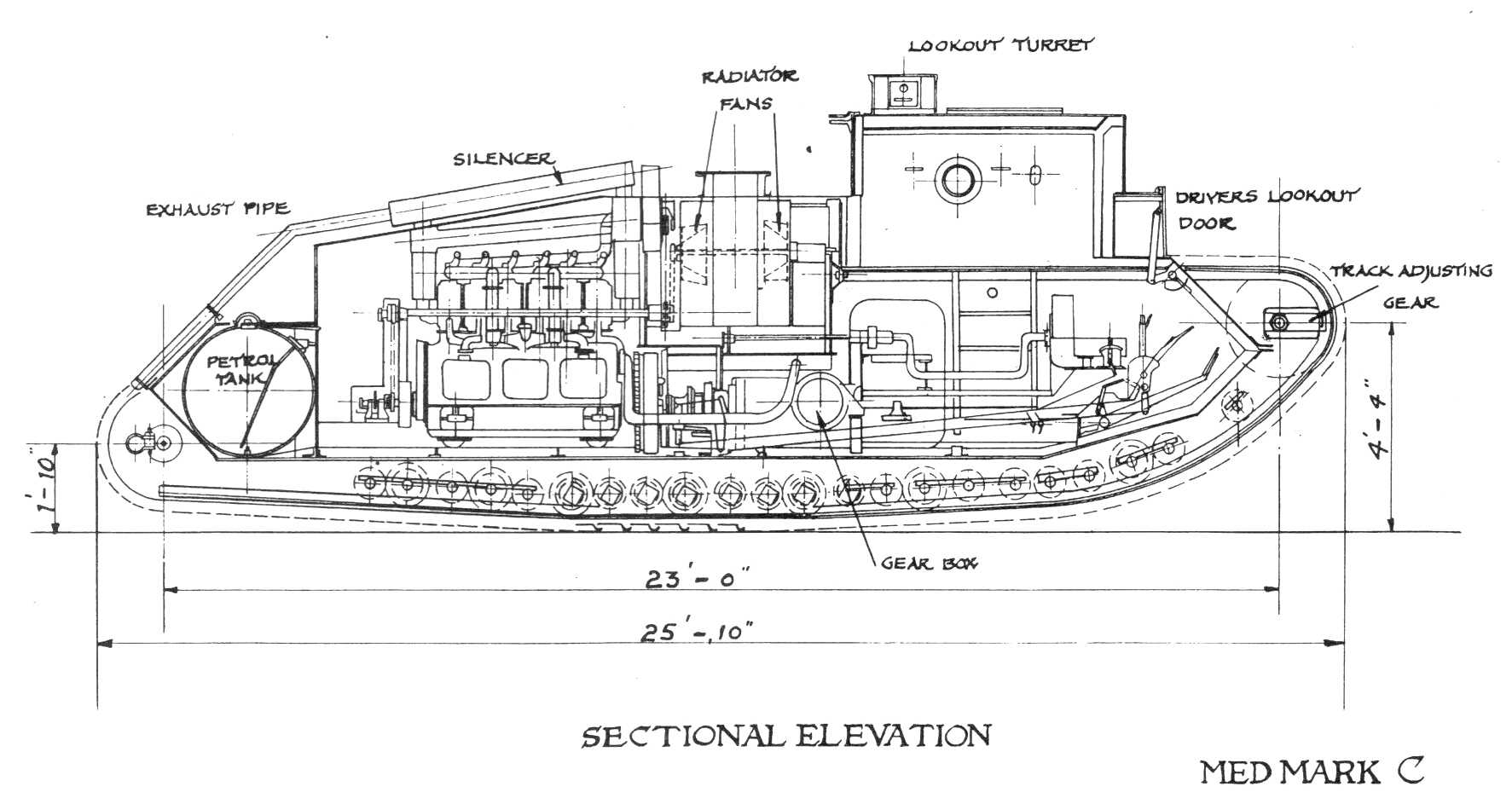 Digitale reproductie foto van de bouwvoorsteltekening van de Medium Mark C tank.